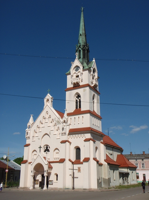 Костел Пресвятої Діви Марії: Костел Пресвятої Діви Марії в місті Стрий, Львівська область, Україна